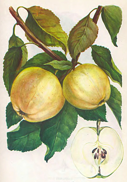 Яблоня «Папировка» («Налив Белый»)